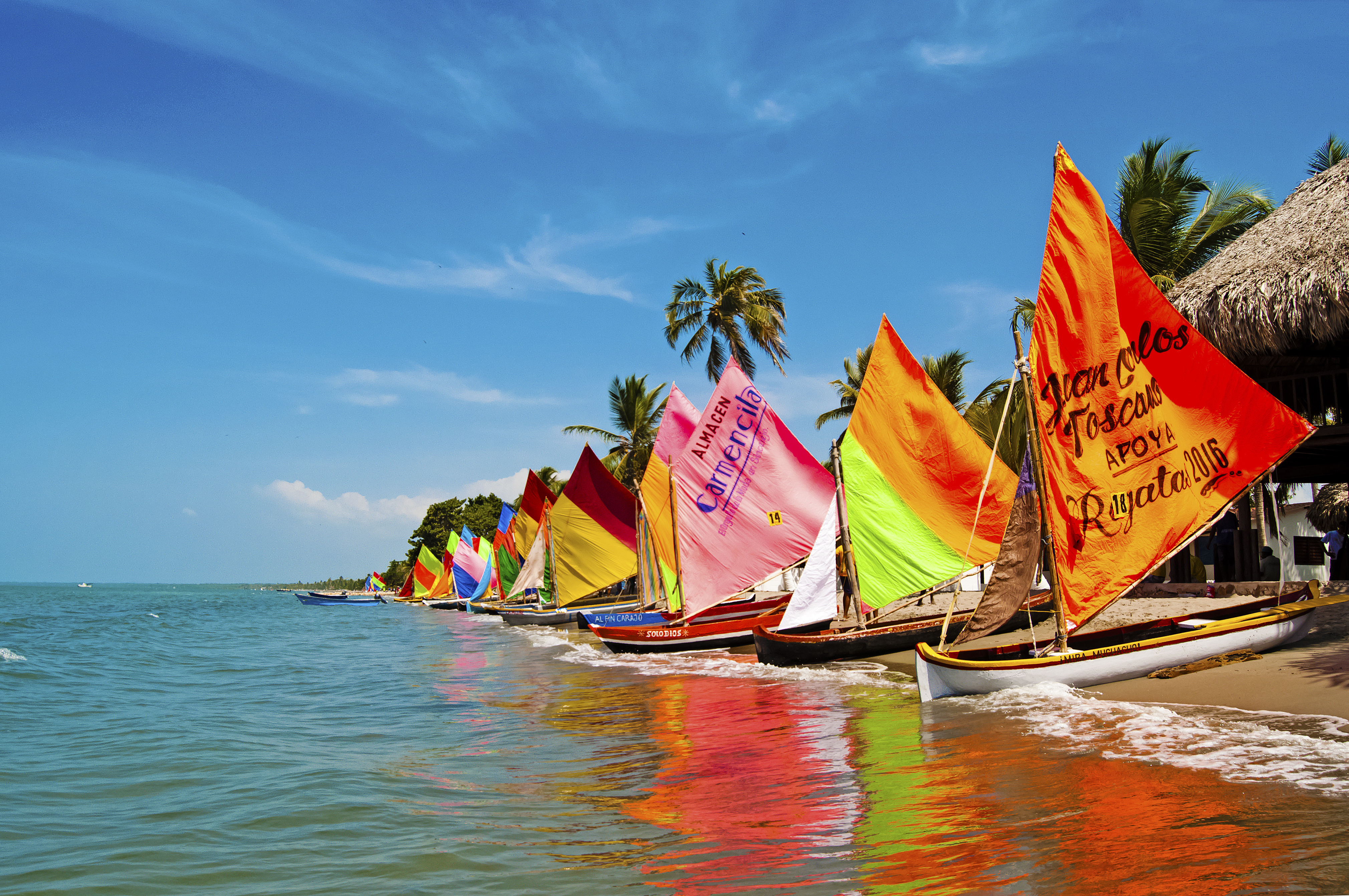 Tolú anualmente organiza una competencia de regata en su hermoso mar, adornándolo con un hermoso arco iris marino. Esta fotografía fue tomada en el municipio colombiano con código 70820.